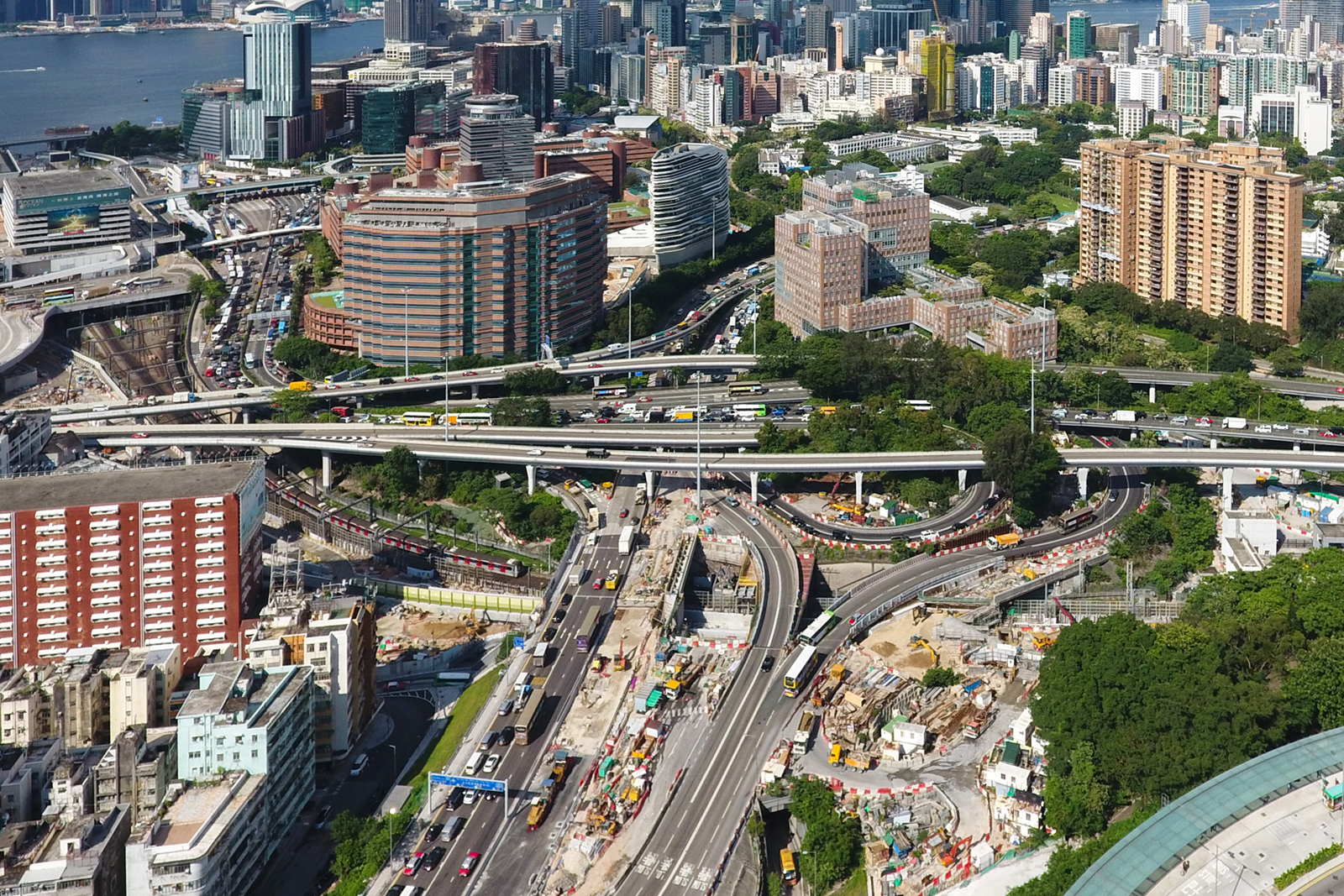 Hung Hom Interchange